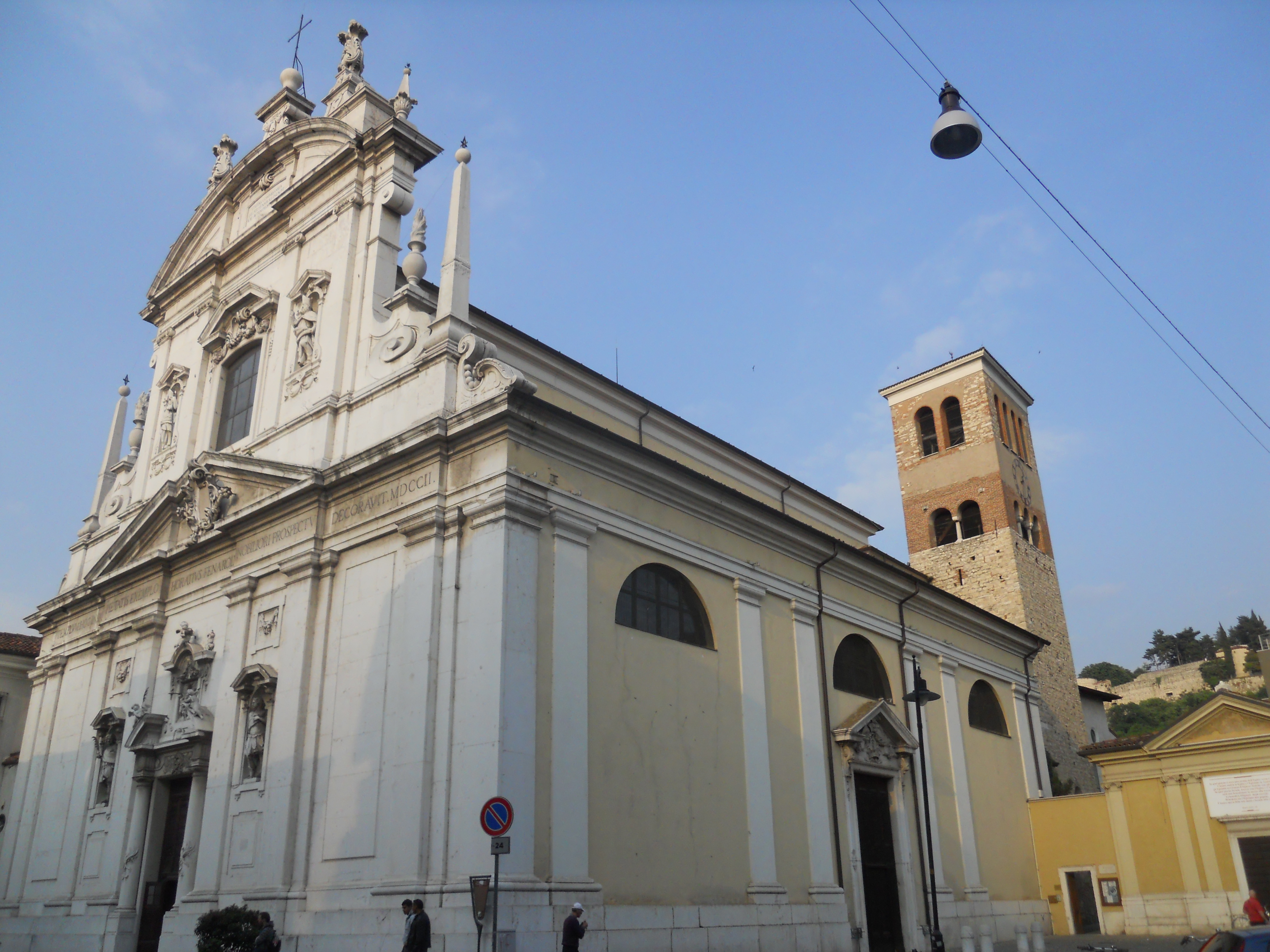 San Faustino maggiore (Brescia) (complesso)